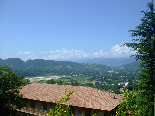 Martvili monastery